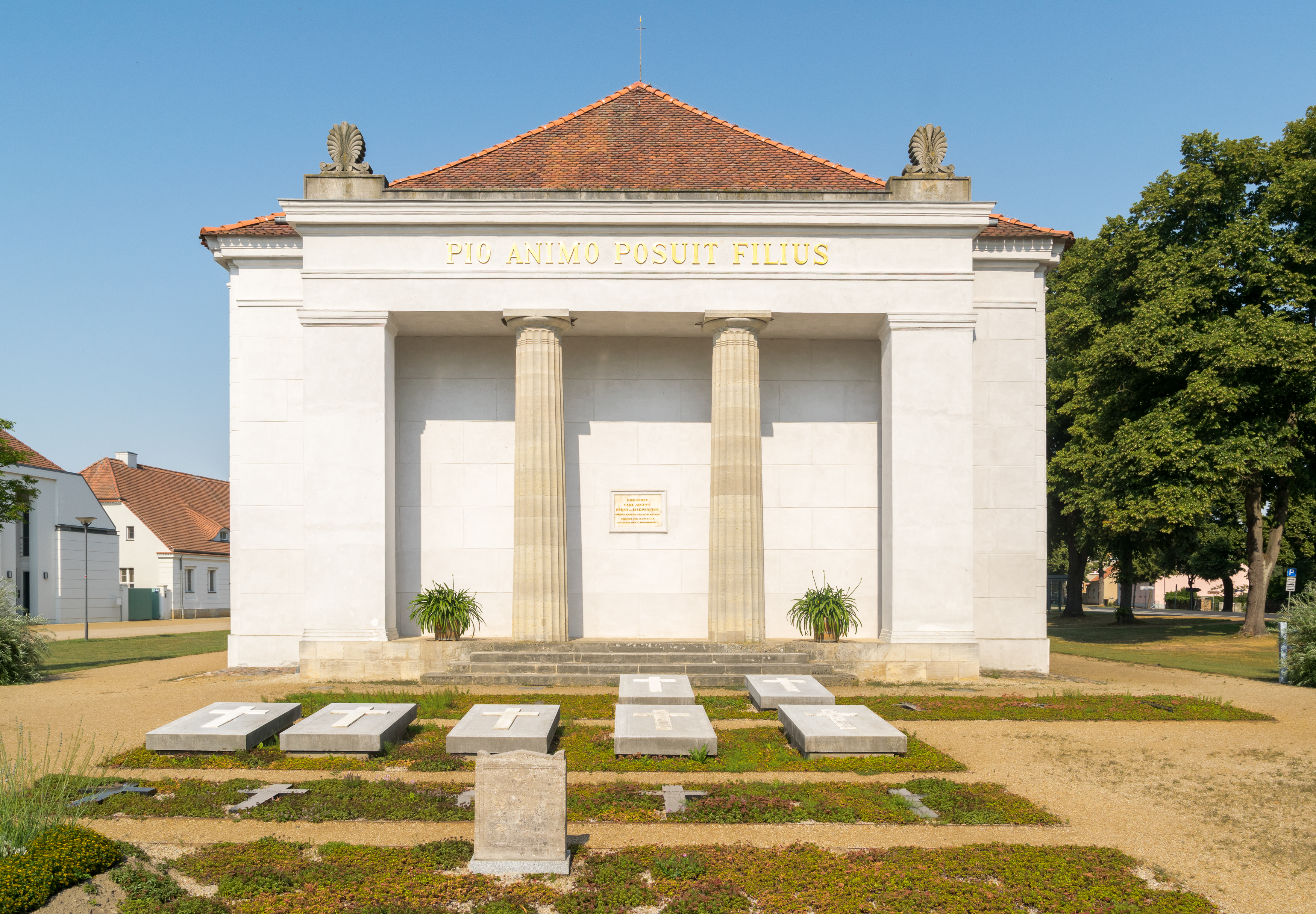 Rückseite der Schinkelkirche in Neuhardenberg, Grabstätte von Karl August von Hardenberg